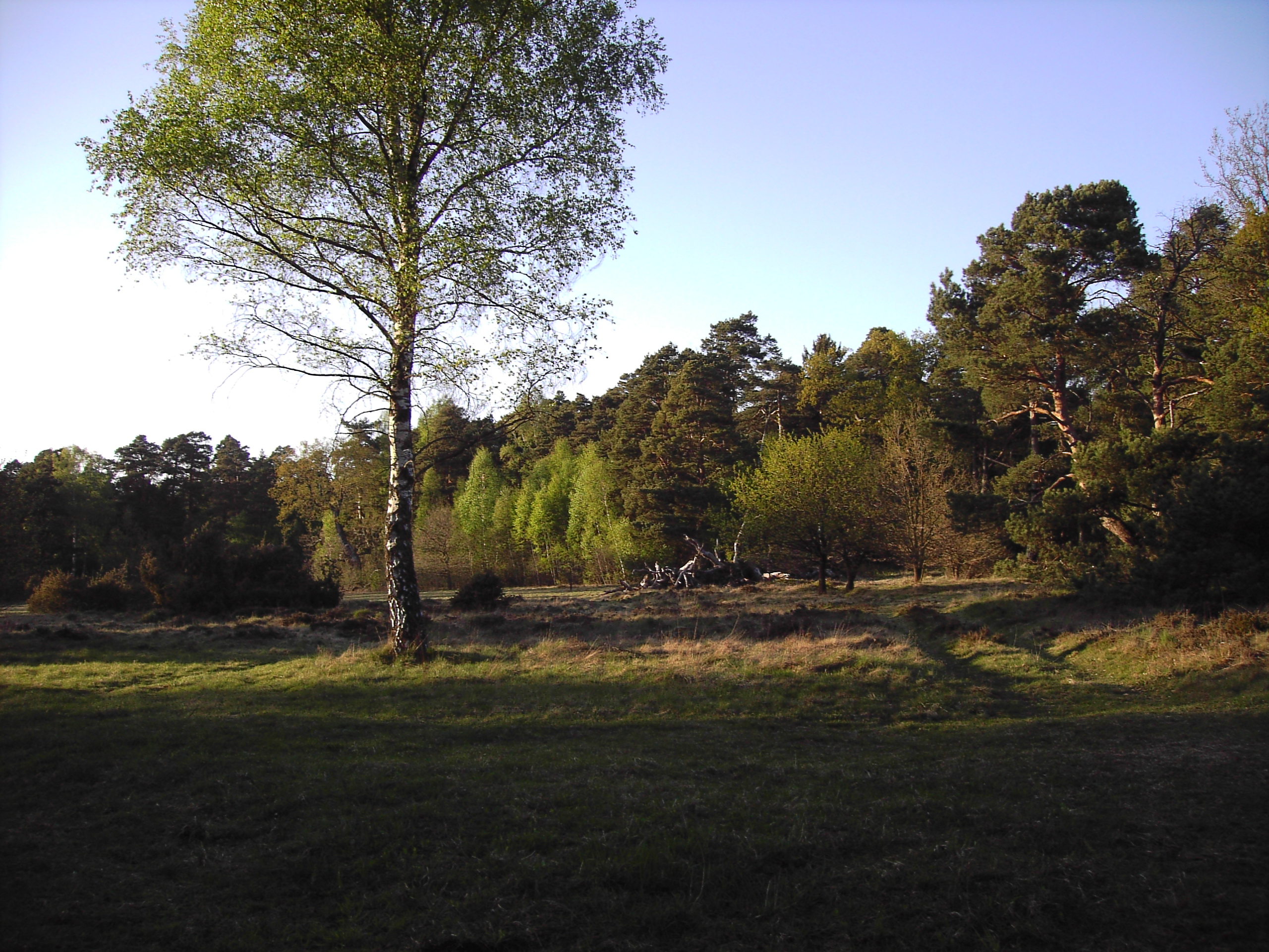 Weidelandschaft in der Nöttinger Heide, NSG „Nöttinger Viehweide und Badertaferl“ in Geisenfeld, Landkreis Pfaffenhofen an der Ilm, Oberbayern